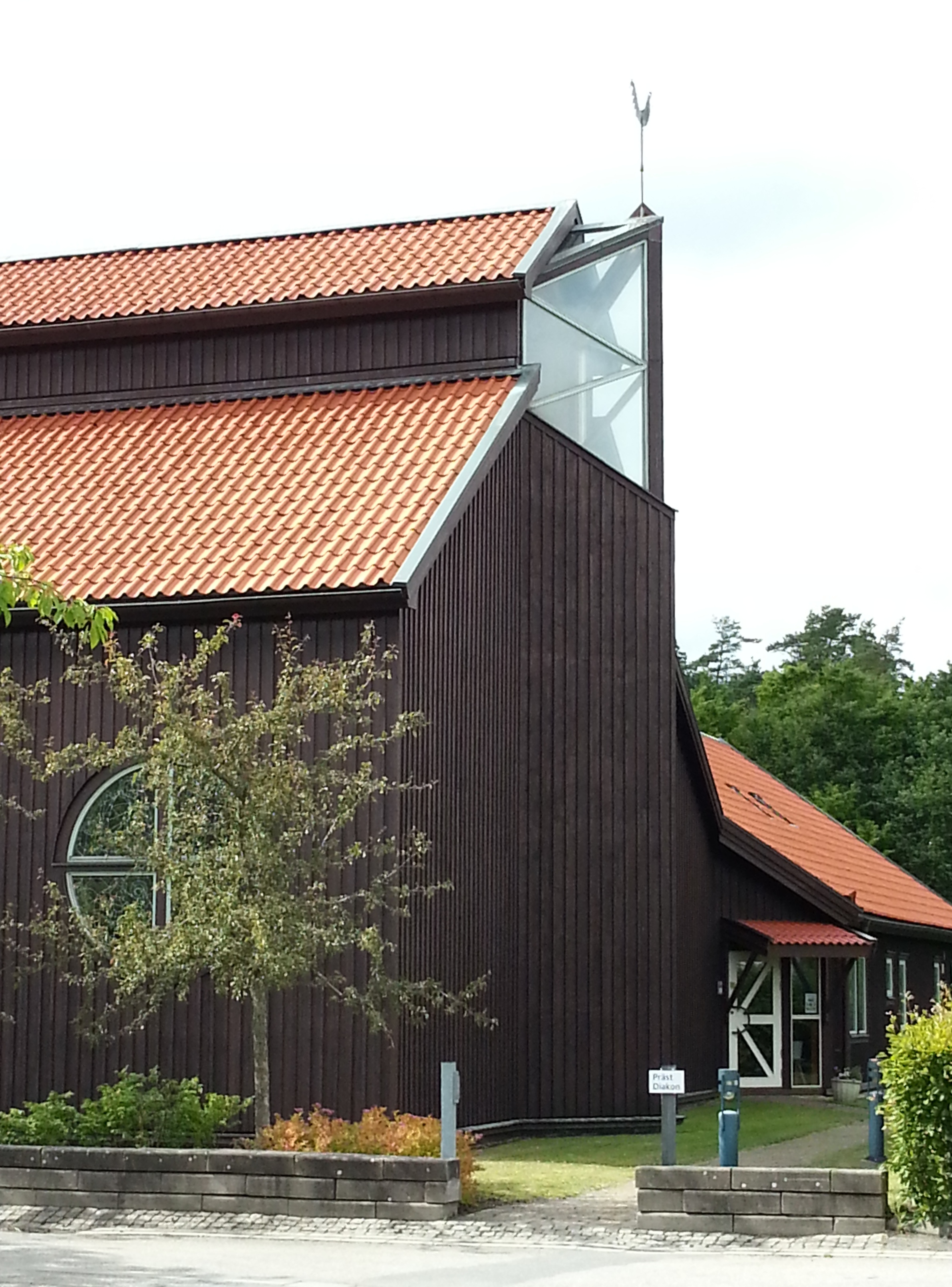 Kullavikskyrkan, den höga gaveln